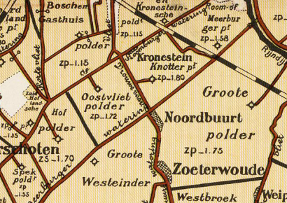 Knotterpolder Zoeterwoude